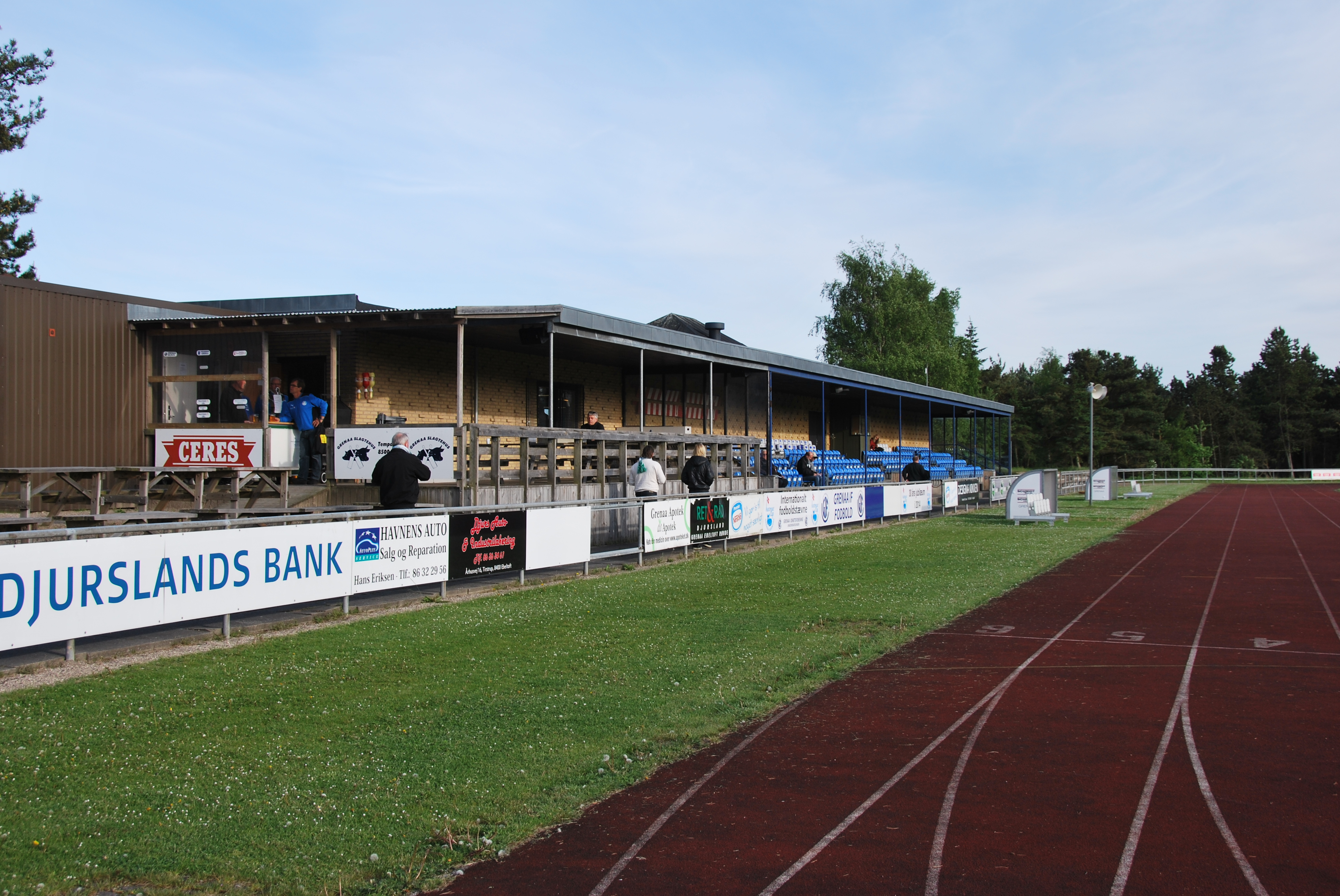 Tribunen på Grenaa Stadion, hjemmebane for FC Djursland.